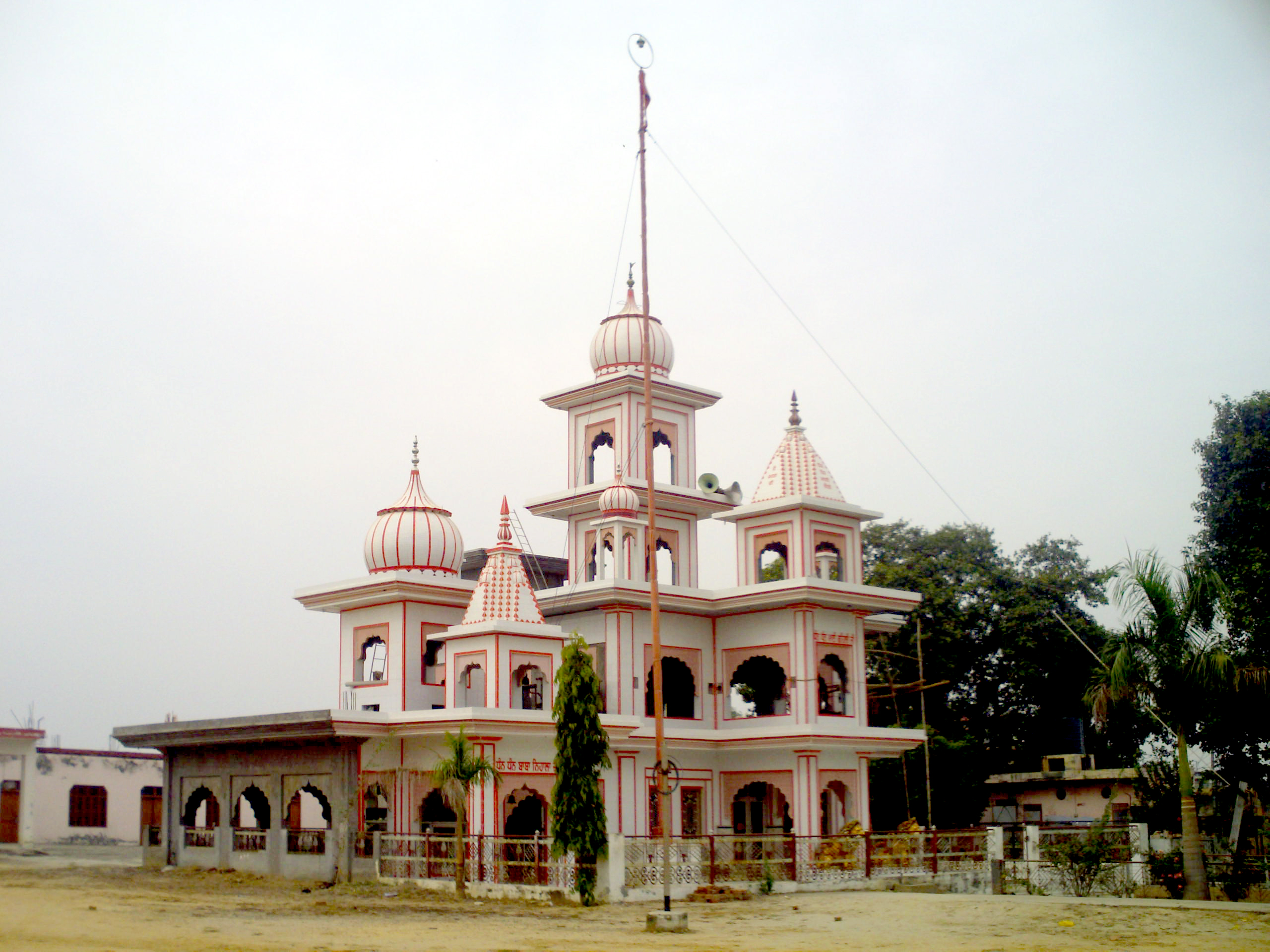 MANDER MAI GEHLI JI